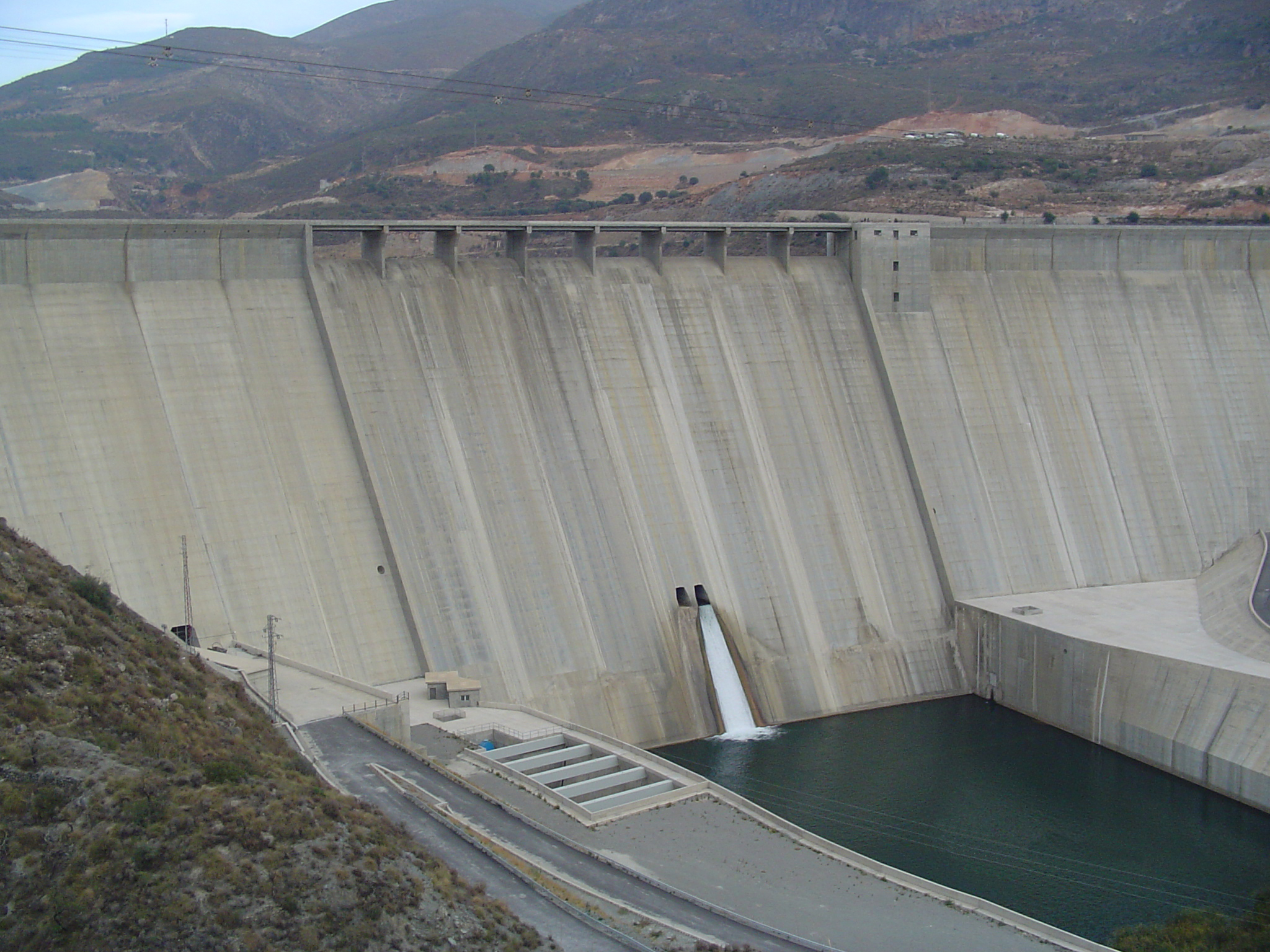 Imagen de la presa de Rules sobre el río Guadalfeo.